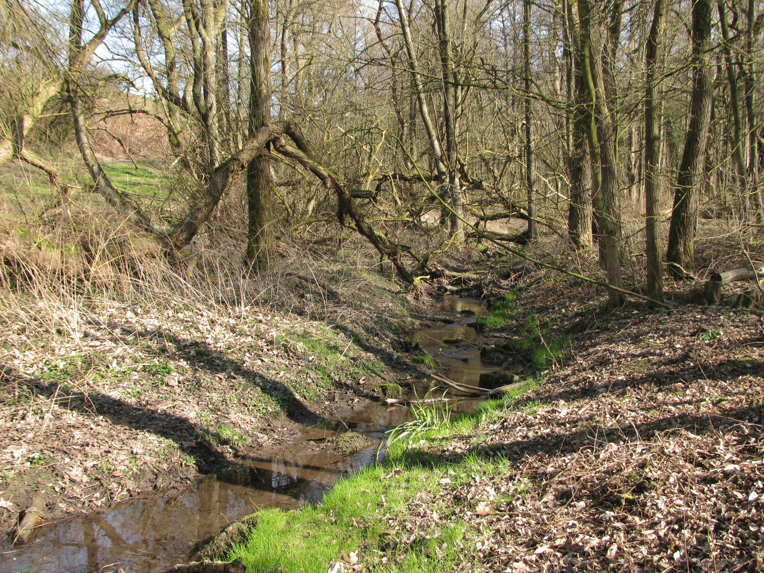 Grummer Bach zwischen Güstenberg (links) und Böckenberg (rechts)